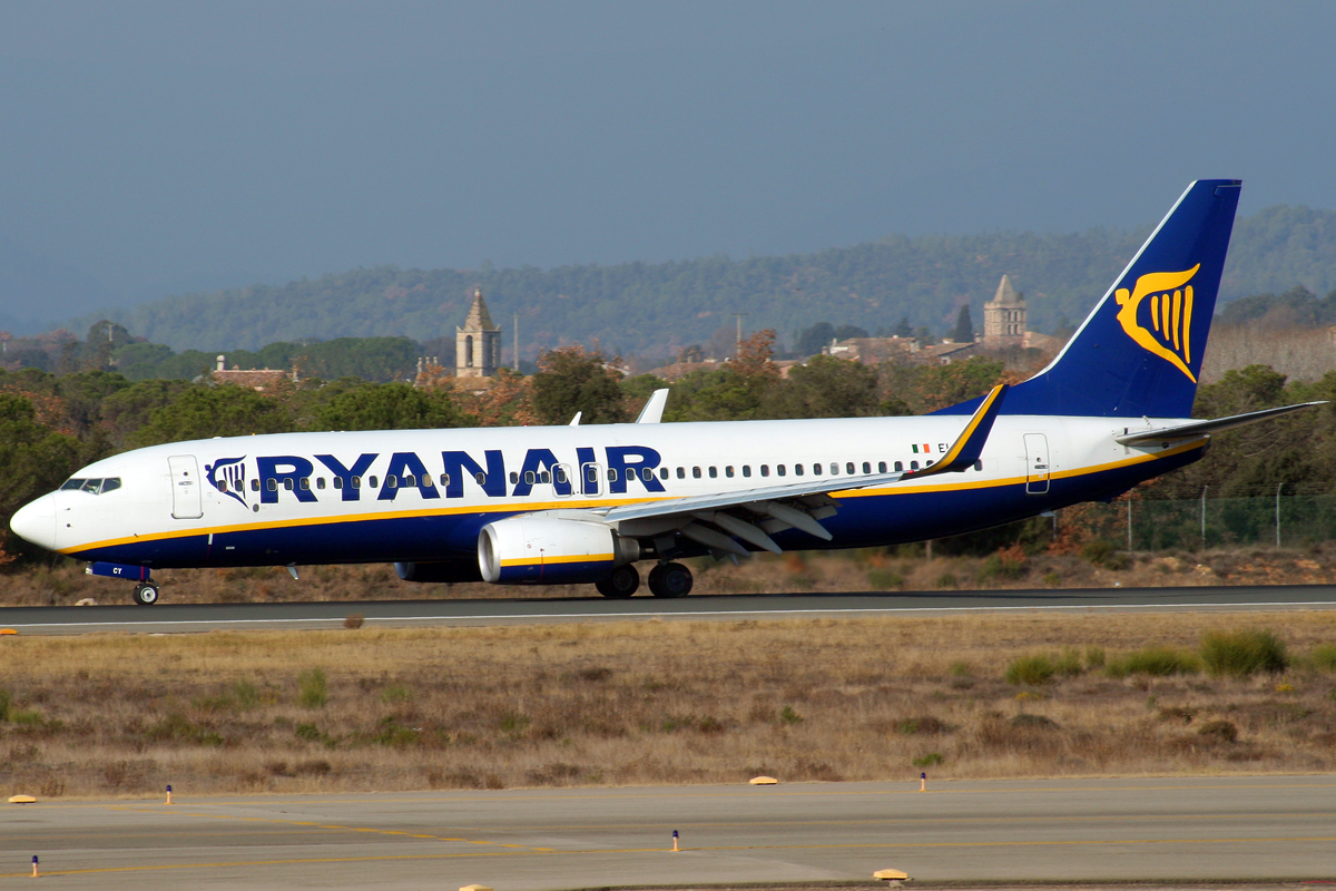 Boeing 737-8AS der Ryanair in GRO